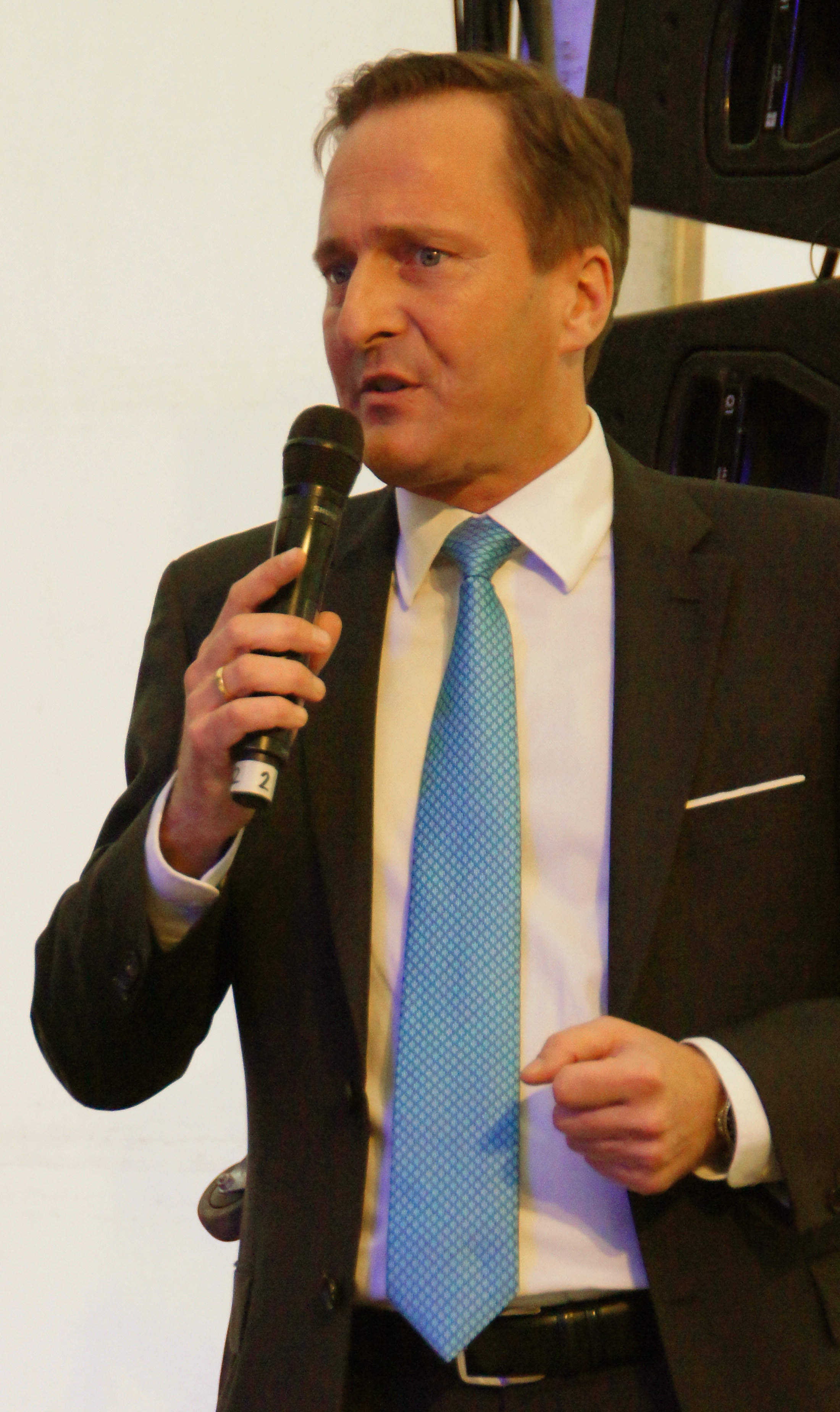 Vienna 2013-05-03 Stadtfest - Manfred Jurazcka